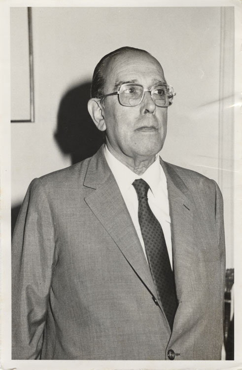 Hugo Rosende Subiabre, Ministro de Justicia de Chile entre 1983 y 1990.